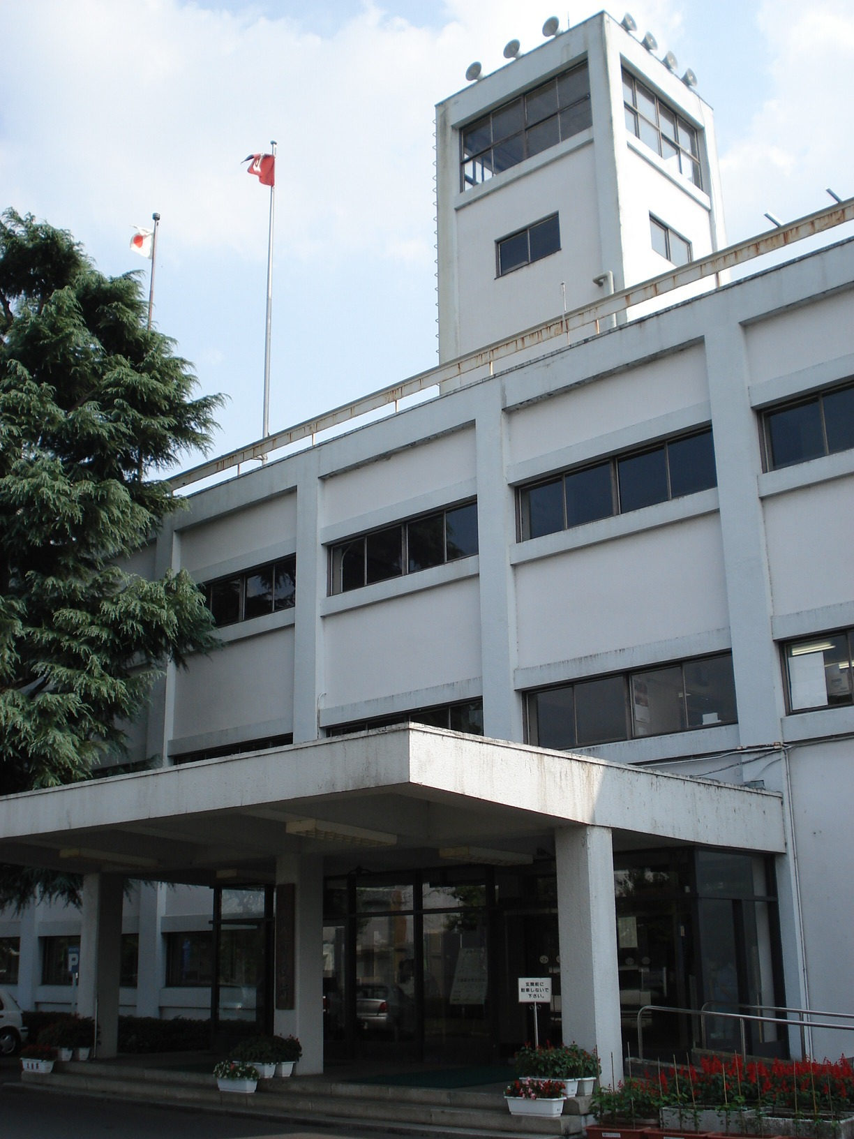 栃木県真岡市 真岡市役所